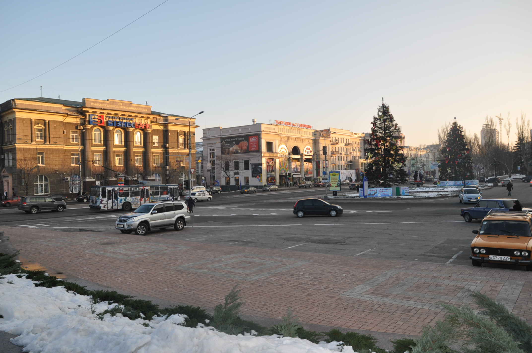 Театральная площадь